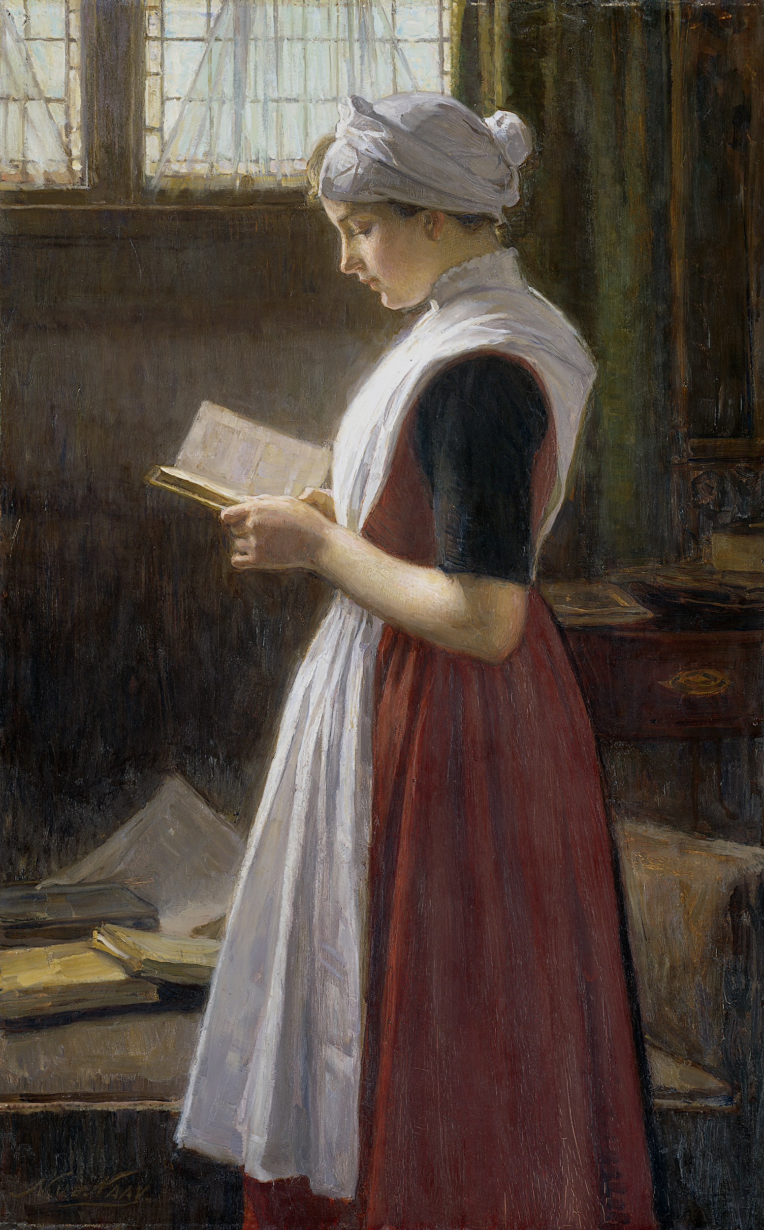 Een Amsterdams weesmeisje. Kniestuk, in profiel naar links, staande lezend in een boek voor een venster. Achter haar een sofa en een tafel waarop meer boeken liggen.